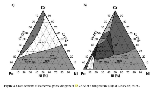 یسیبل